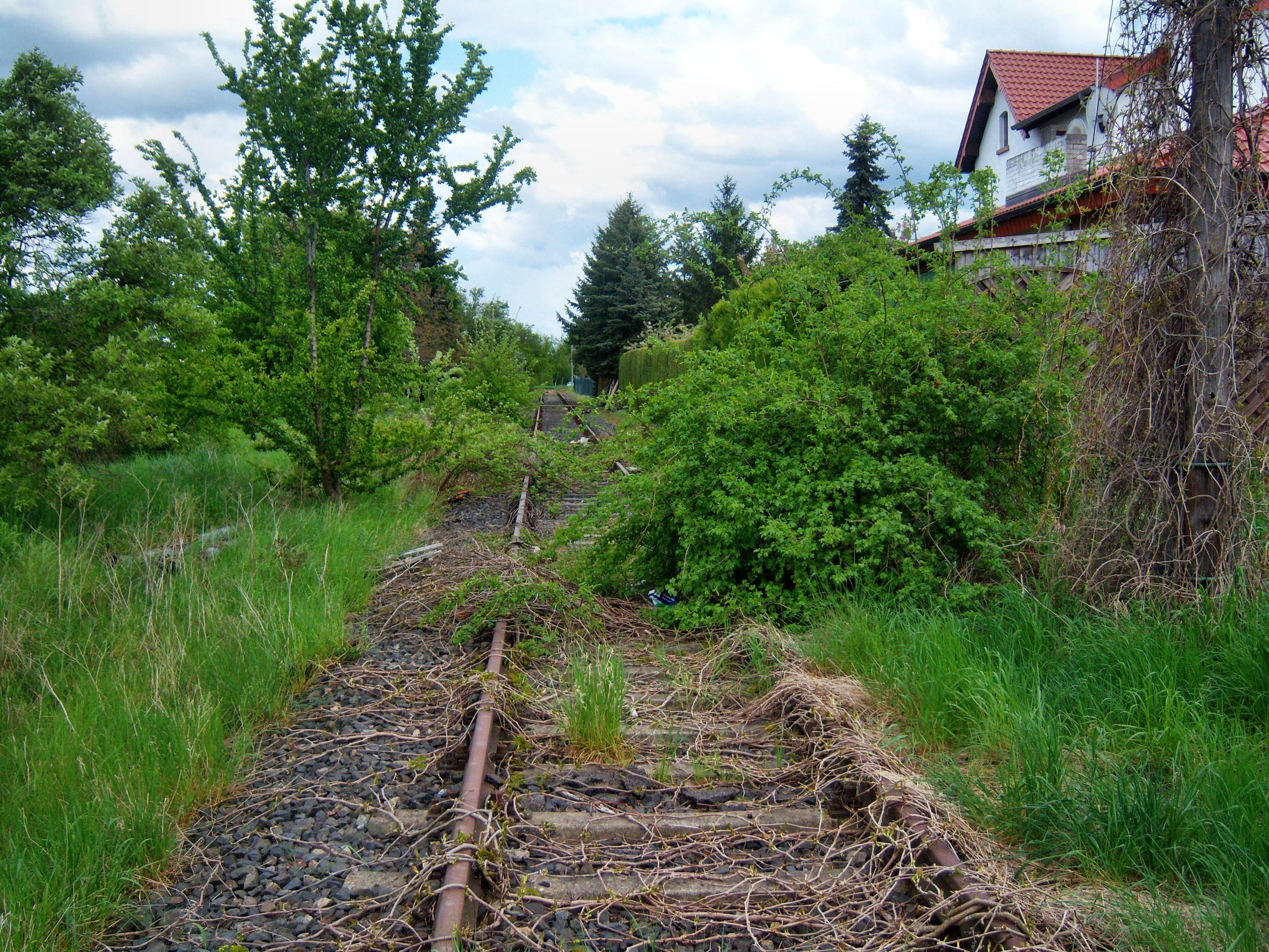 Gleise der Bahnstrecke Osthofen–Rheindürkheim–Guntersblum im alten Bahnhof des rheinhesssischen Gimbsheim (Blickrichtung Osthofen) in Rheinland-Pfalz (Deutschland)